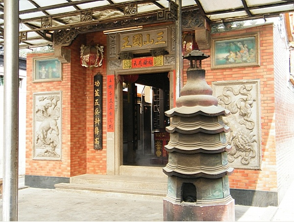 西墩三山国王庙